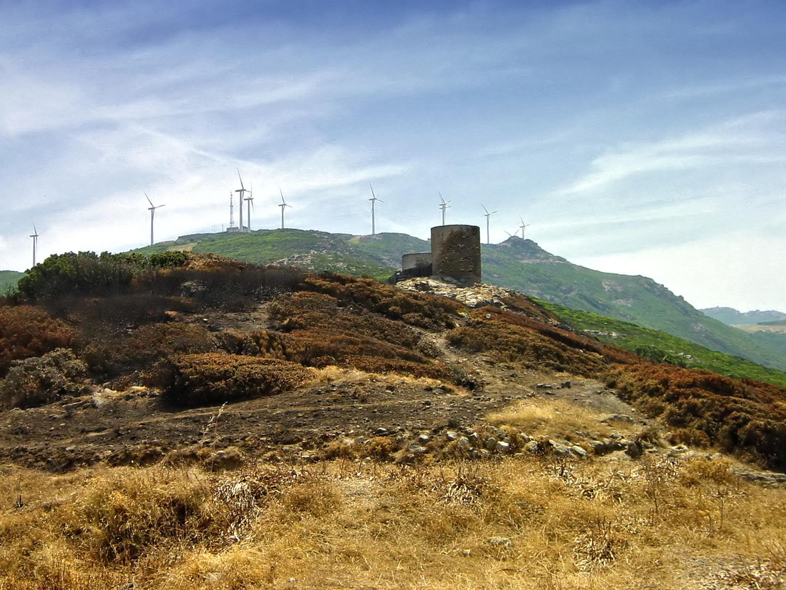 Centuri (Haute-Corse) - Anciens moulins du col de la Serra après l'incendie